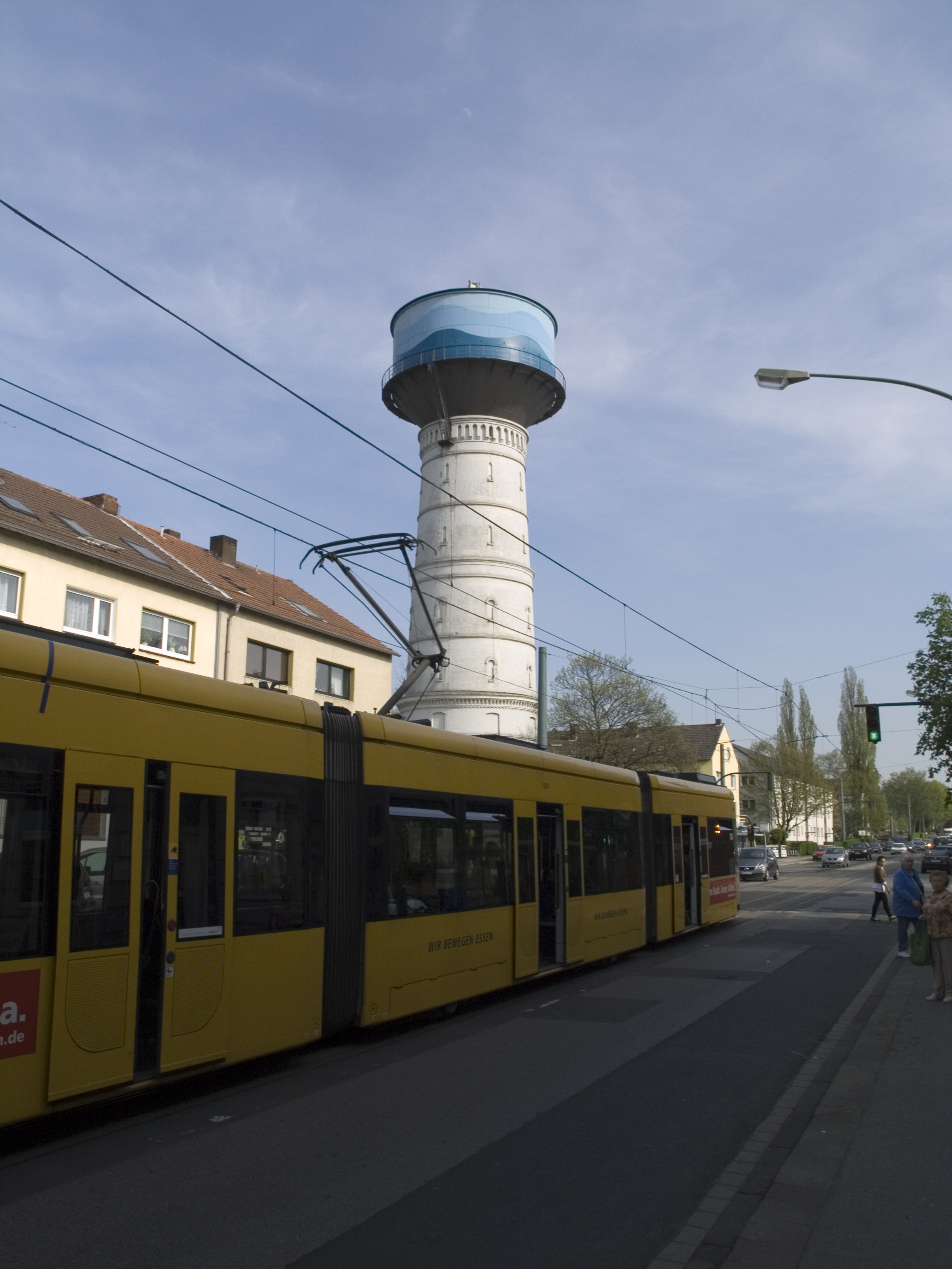 Северный Рейн - Вестфалия, Эссен - водонапорная башня Фринтроп